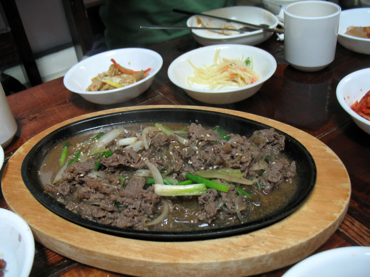 Bulgogi at Jung Soo Nae, January 16, 2009